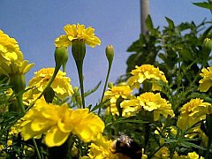 Voorbeeld scherptefilter. Eigen foto.